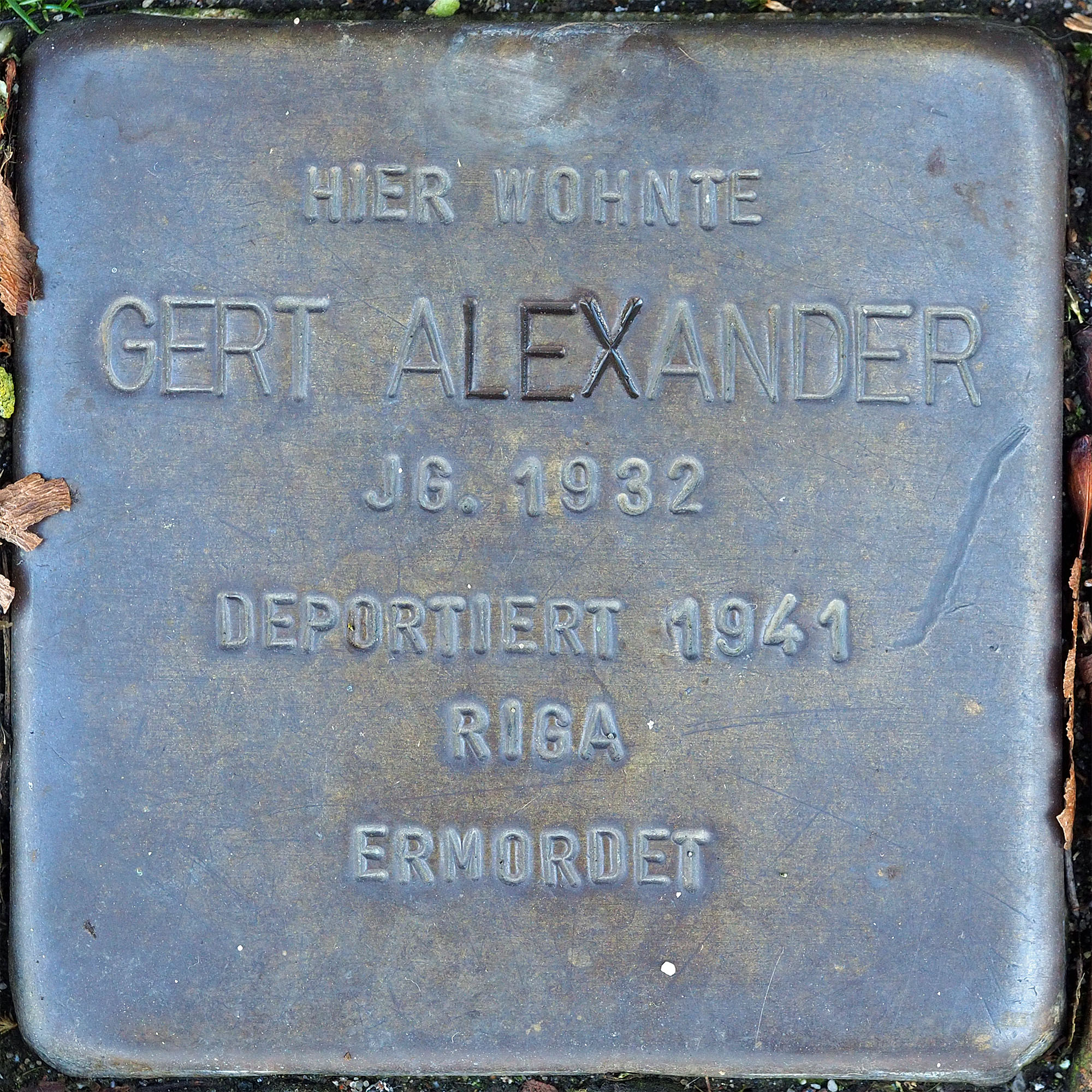 Stolpersteine MG: Alexander, Gert